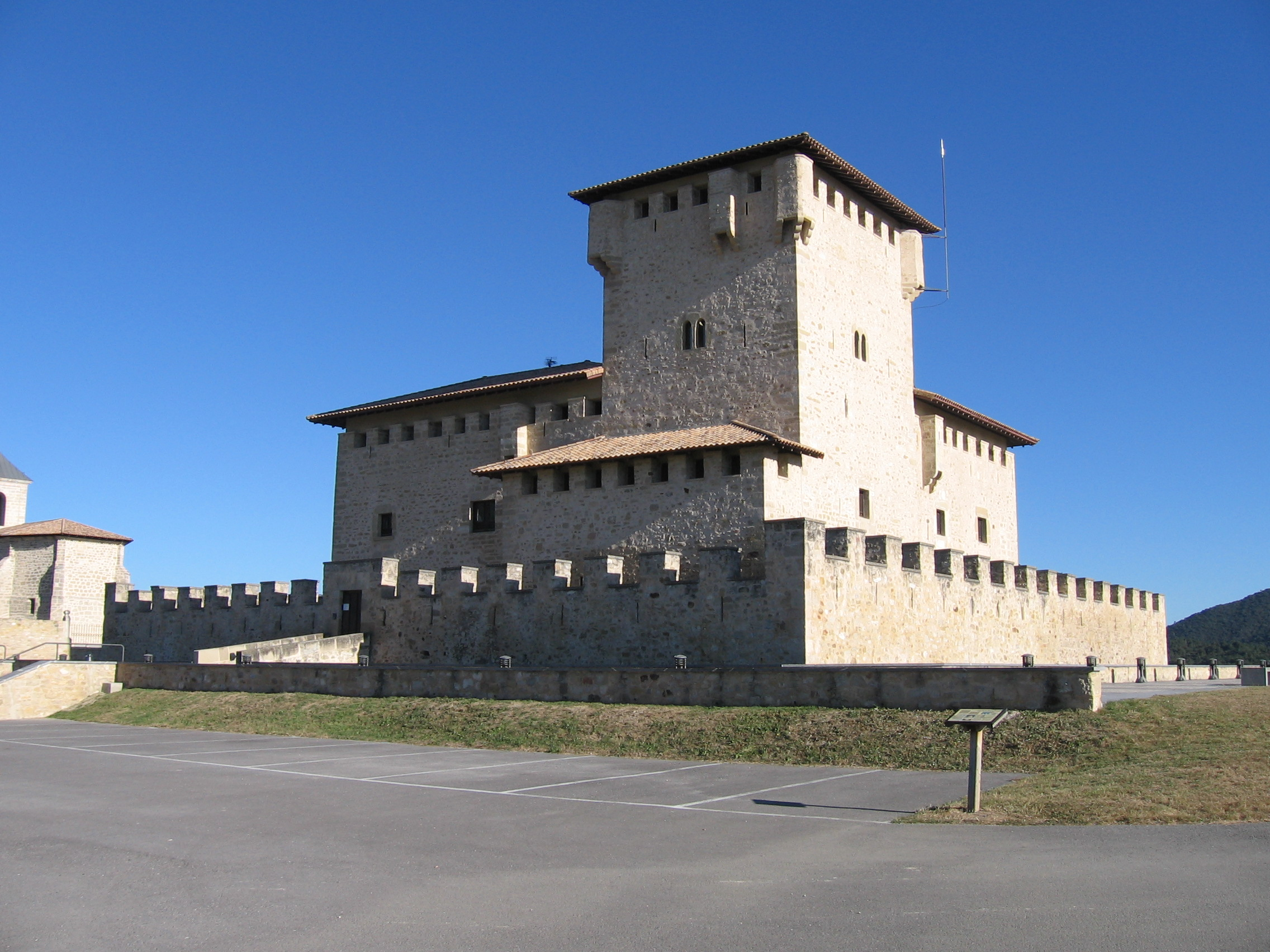 Casa-Torre de Varona